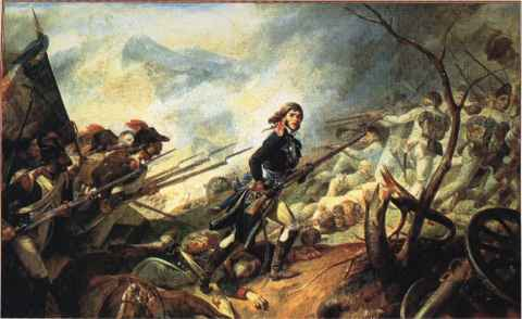 Joubert lancer la contre-attaque victorieuse contre l´armee autrichienne